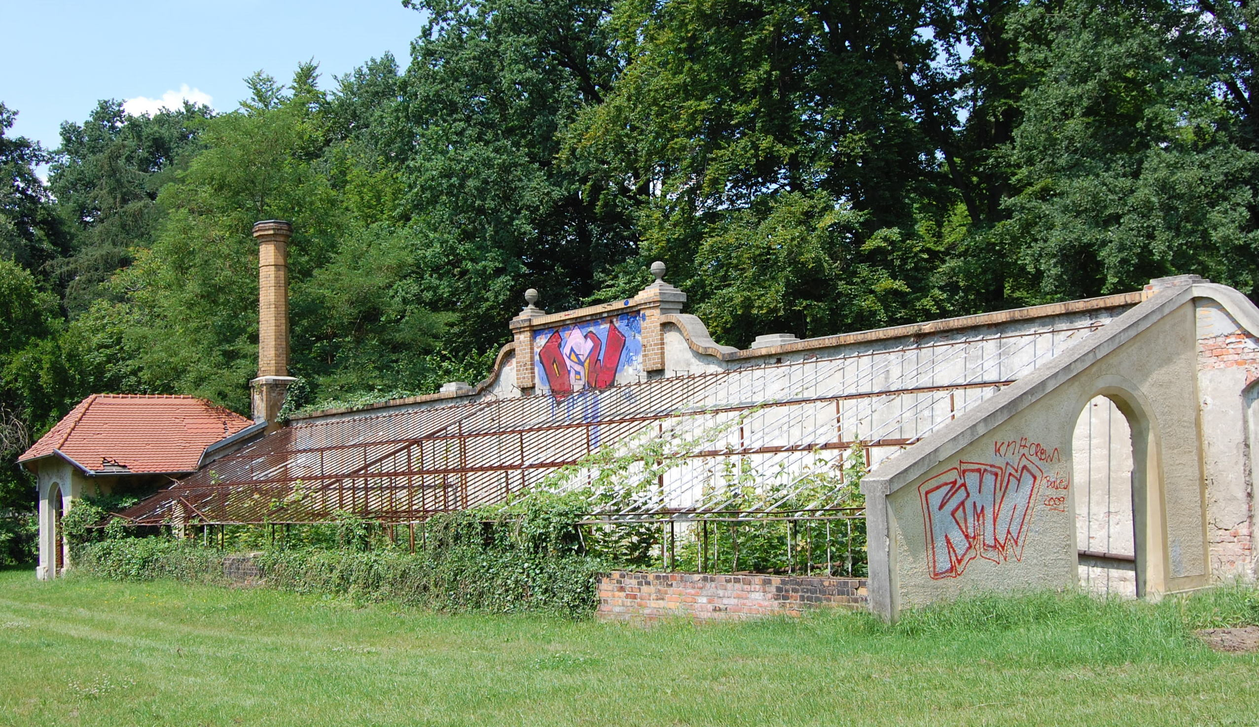 verfallenes Gewächshaus am Schloss Vetschau